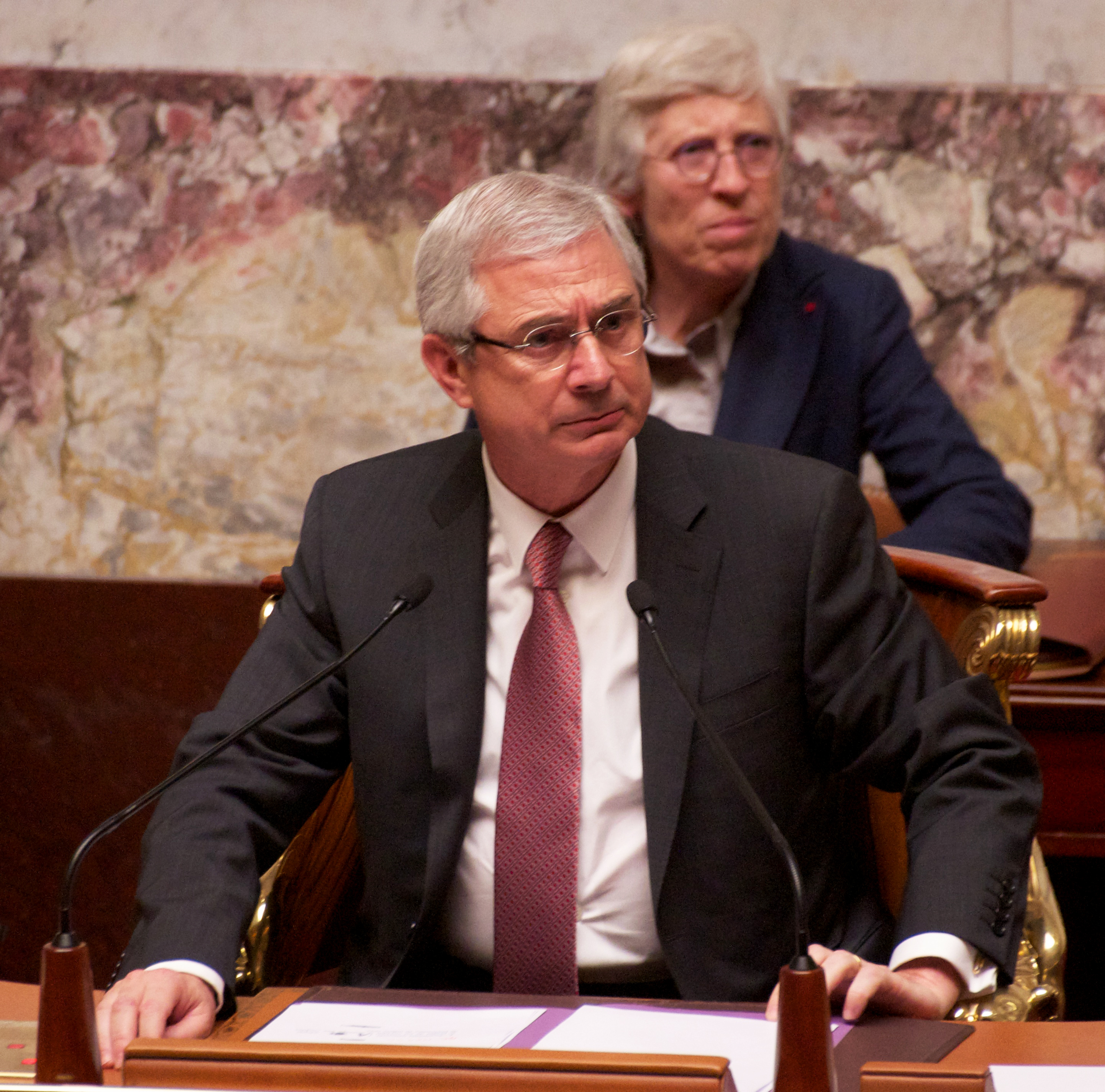 Vote solennel de la loi ouvrant le mariage aux couples de personnes de même sexe - Assemblée nationale. Au premier plan, Claude Bartolone, président de l’Assemblée Nationale, préside la séance. Il est assisté par Corinne Luquiens, secrétaire générale de l’Assemblée et de la présidence, à l’arrière plan.